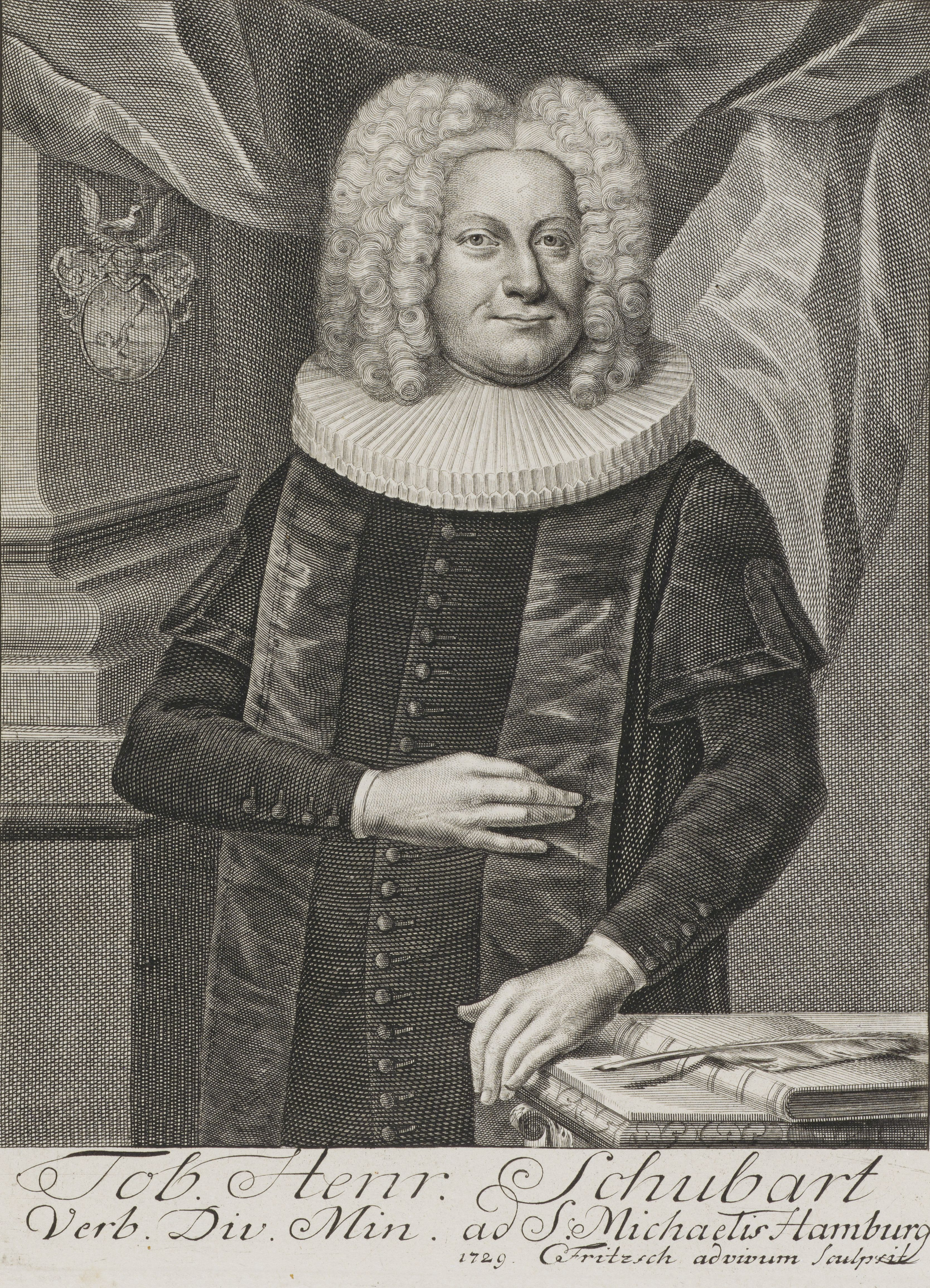 Bildnis von Tobias Heinrich Schubart